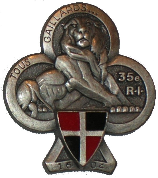 Insigne du 35° RI